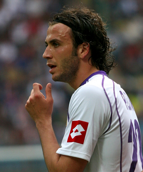 Giampaolo Pazzini, italian soccer player